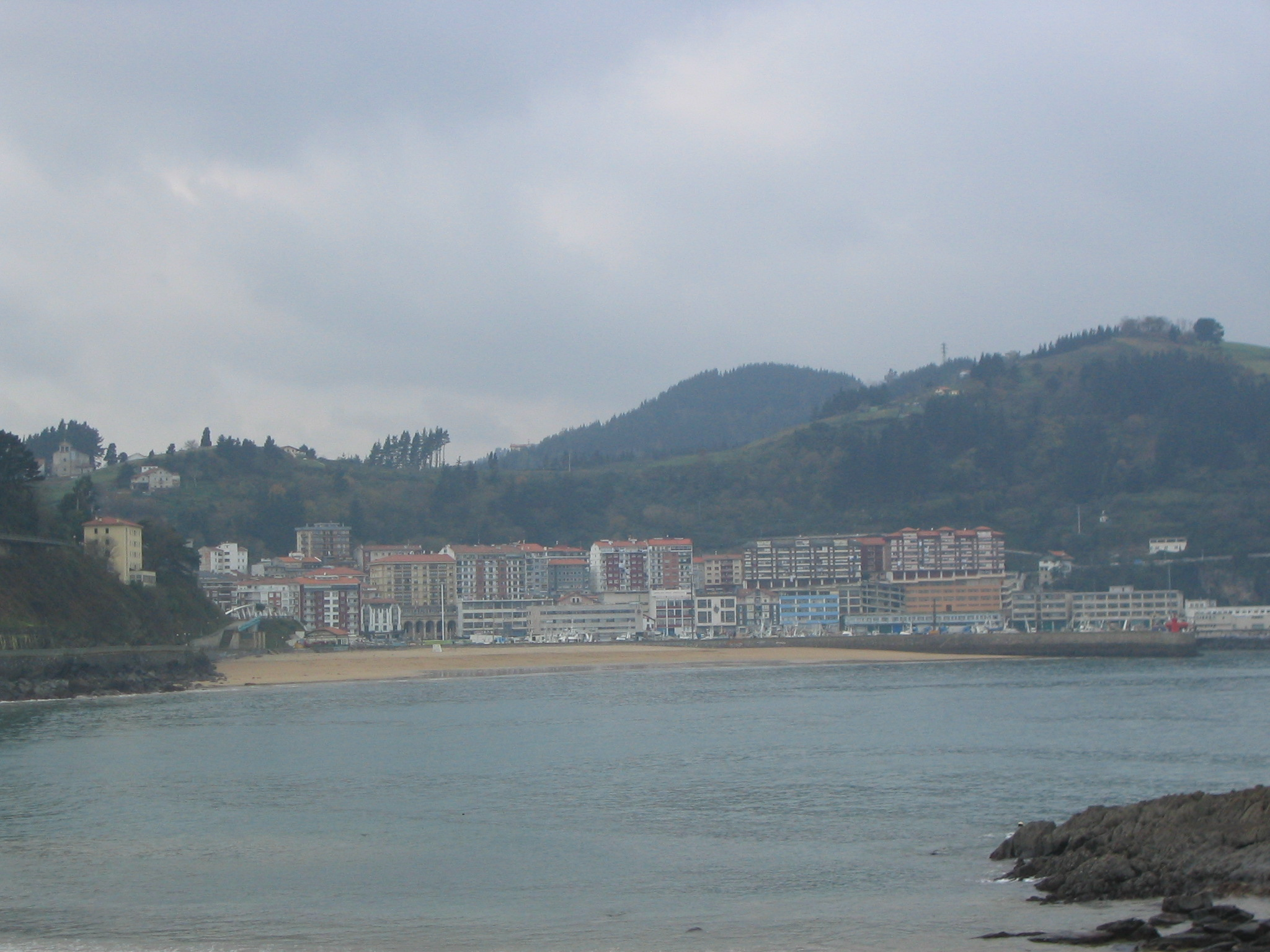 Playa de Arrigorri en Ondarroa, Vizcaya, País Vaco, España.